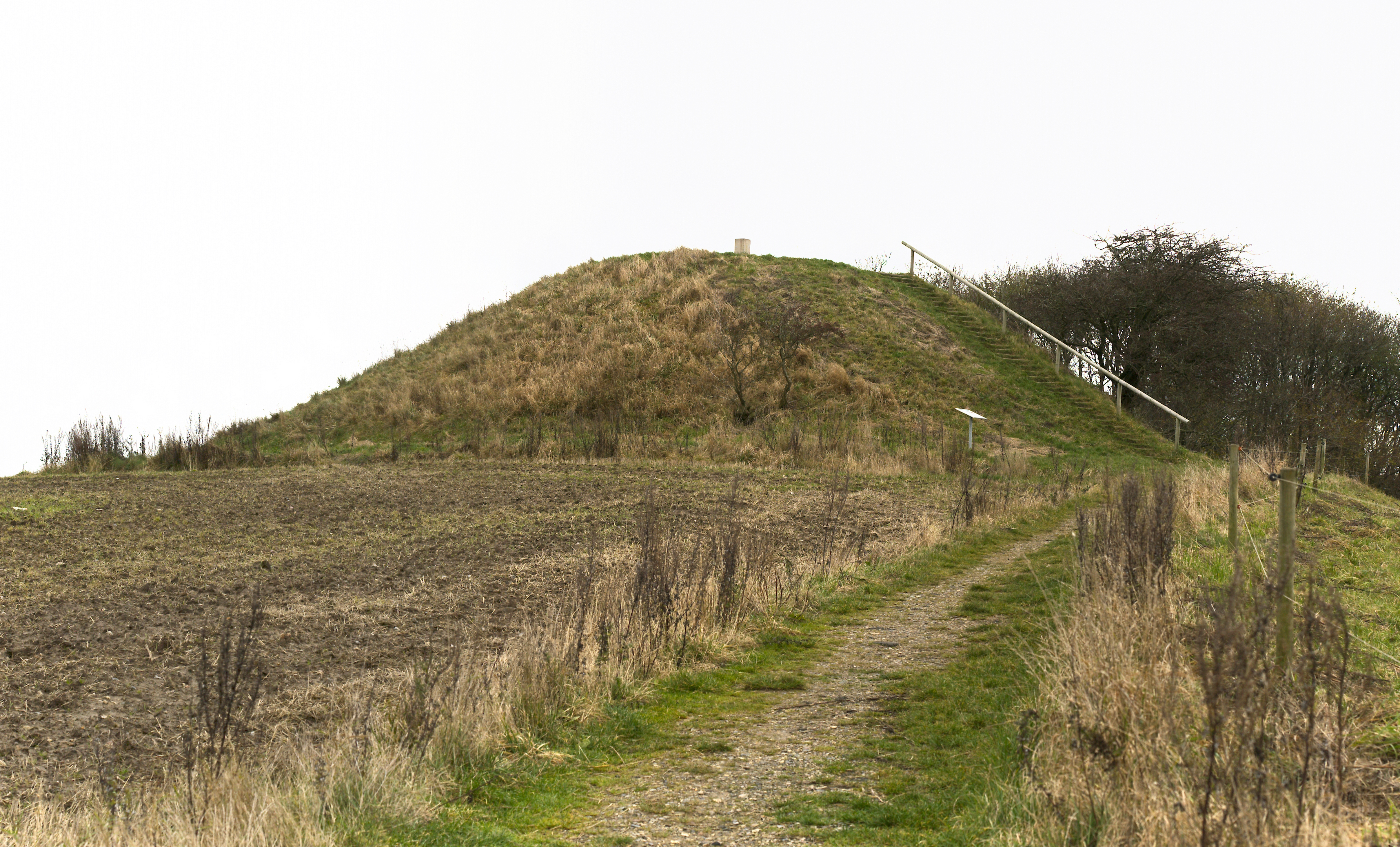 Jelshøj med postament på toppen